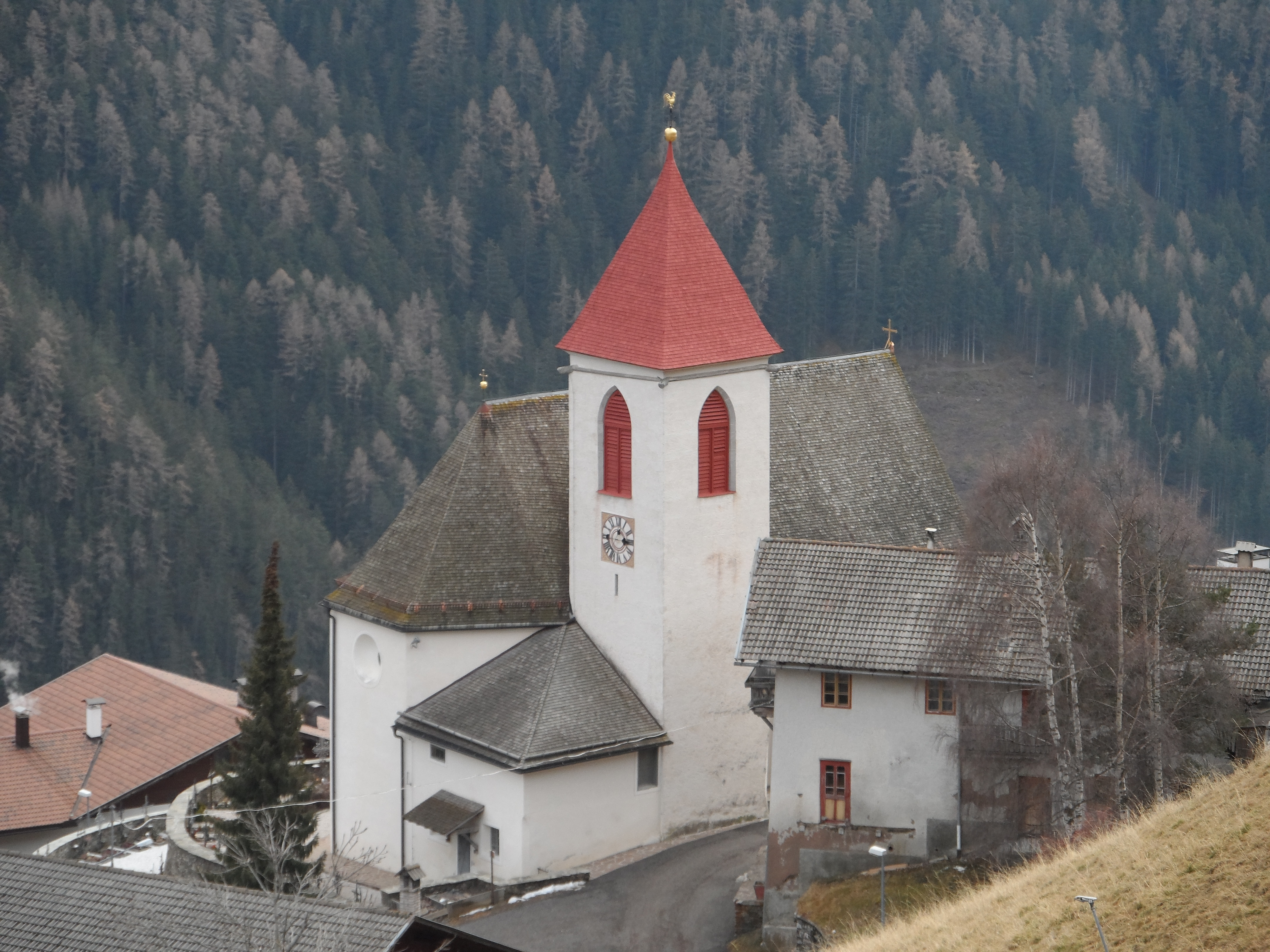 Pfarrkirche St. Georg - Afers, Brixen